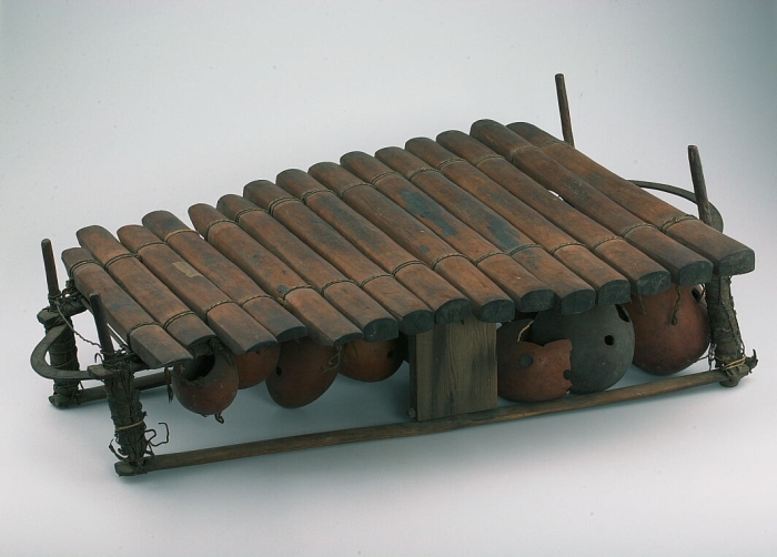 Deze xylofoon heeft 12 toetsen (lamellen), met daaronder een aantal kalebas-klankkasten. In de kalebassen is een gaatje gemaakt dat met een membraantje is afgeplakt; dit geeft een zoemend geluid en is daardoor een 'mirliton' (een membranofoon). De grootte van de toetsen en de kalebassen bepaalt de toonhoogte. Het geheel rust in een houten frame met ijzeren draagbeugels. De stok waarmee het instrument bespeeld wordt is 24 cm lang en aan het uiteinde met bies omvlochten en daarna met hars besmeerd. (Een tweede stok ontbreekt.)